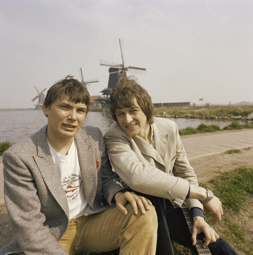 De Noorse zangers Sverre Kjelsberg en Mattis Hætta tijdens een fotosessie voor het Eurovisie Songfestival 1980